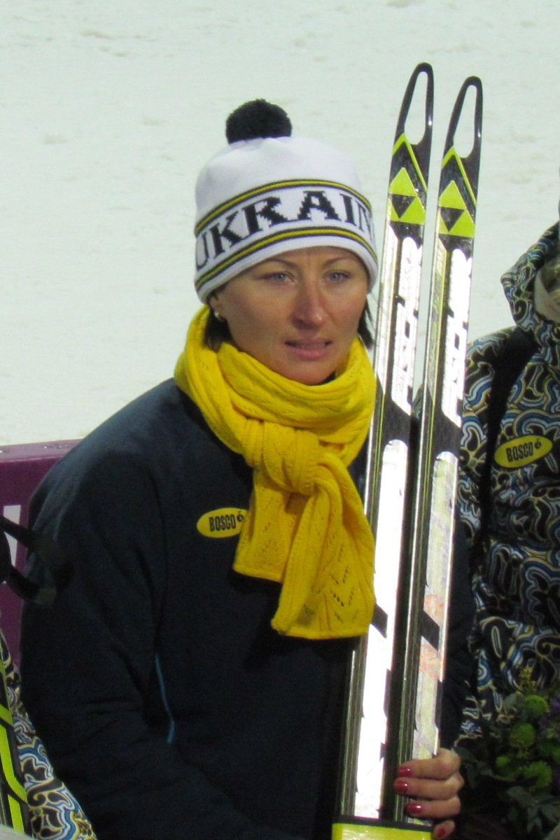 Олімпійська чемпіонка Віта Семеренко